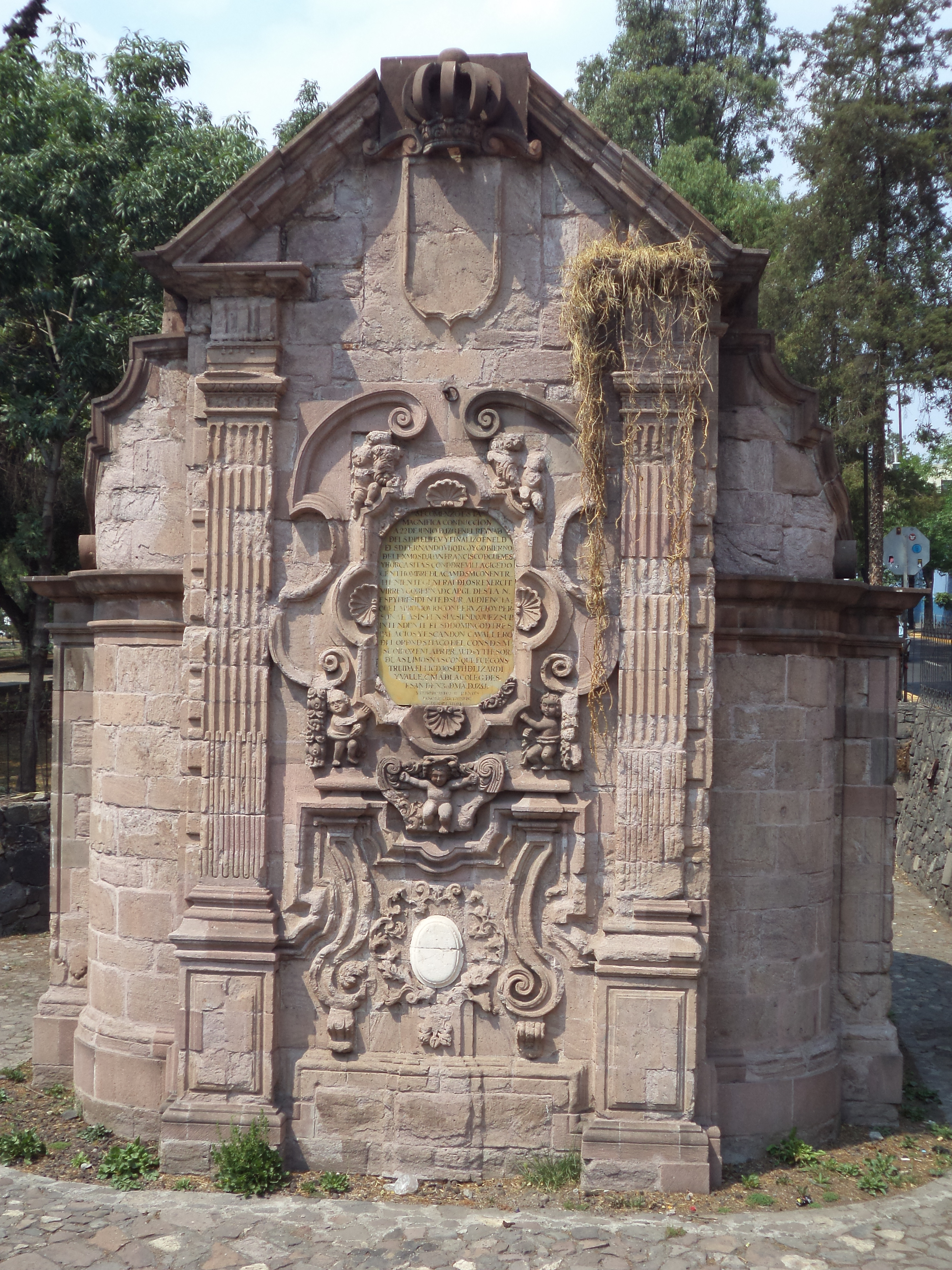 Acueducto de Guadalupe Hidalgo